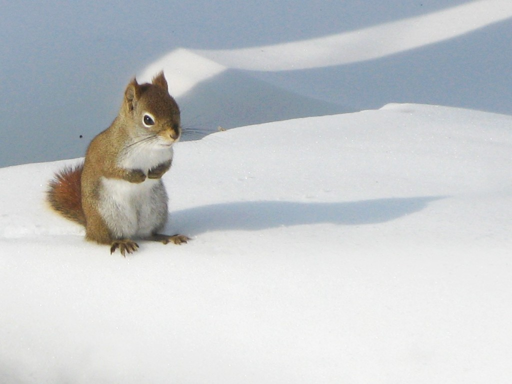 Tamiasciurus hudsonicus Écureuil roux nord-américain -- North American Red Squirrel Bas-Saint-Laurent -- Province de Québec -- Canada Prise en mars 2008 -- Taken in March 2008